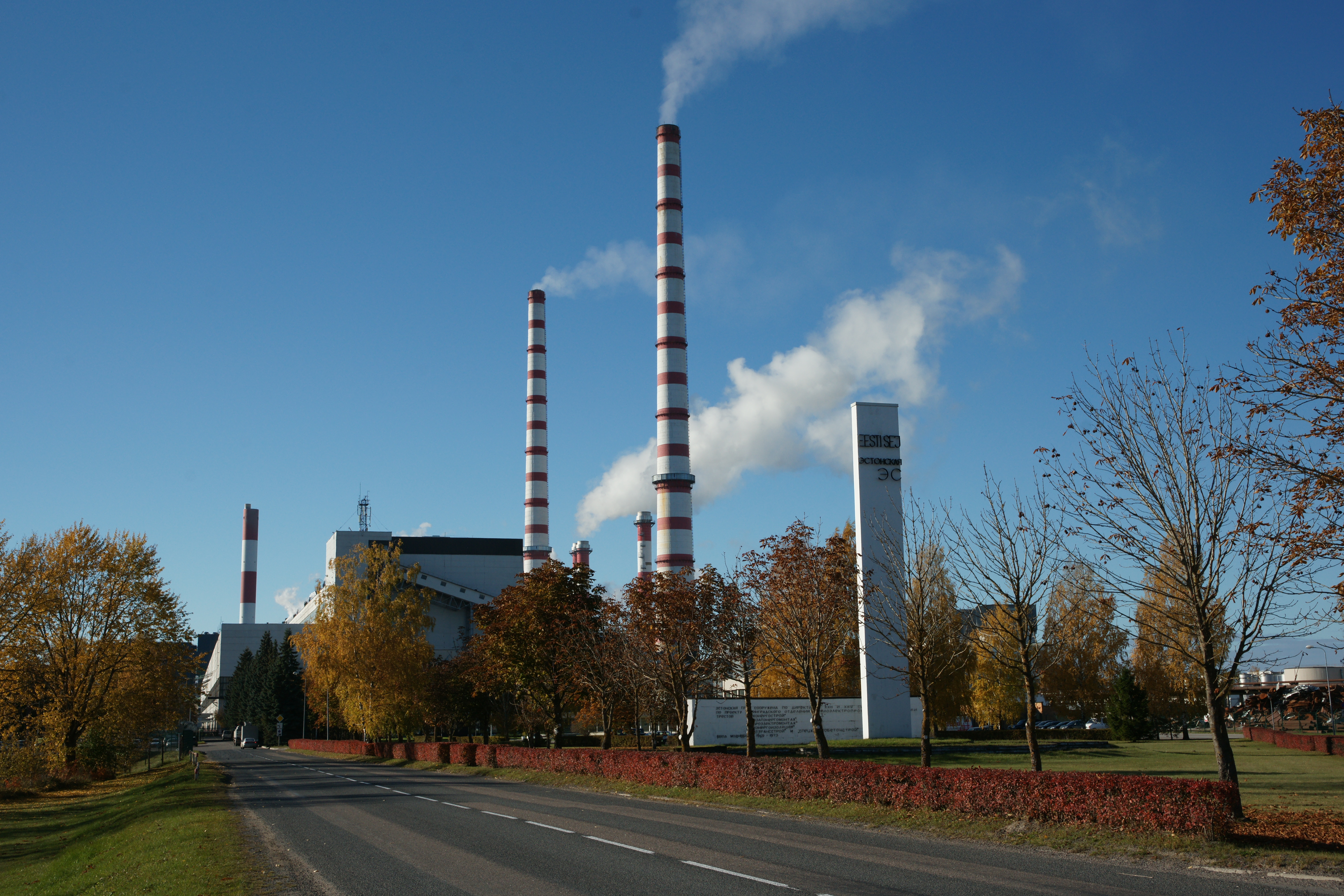 Eesti Elektrijaam, sügis 2015